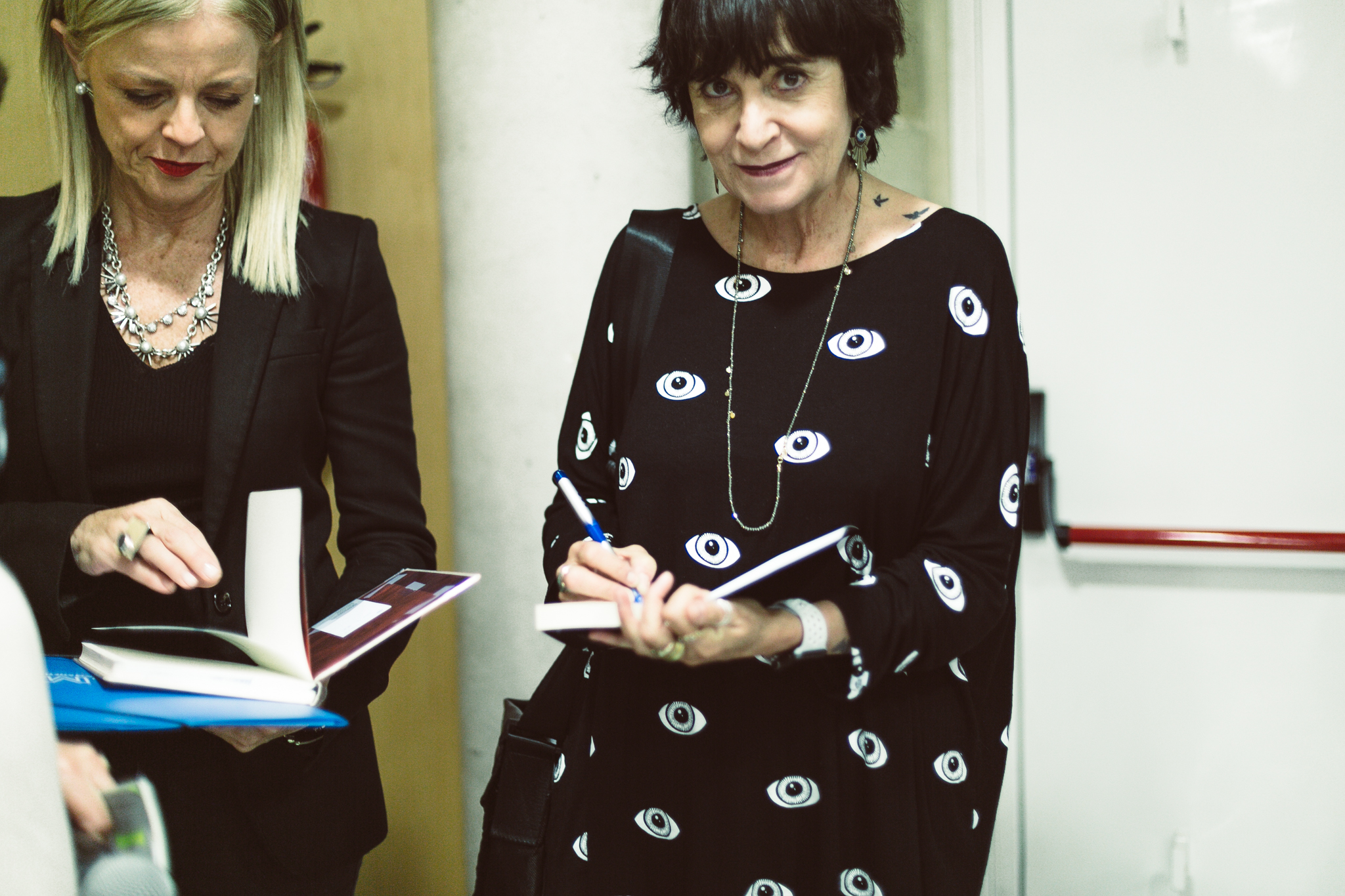 Literaktum 17 Tomasene Kultur Etxea Argazkilaria/fotógrafa: Lorena Otero